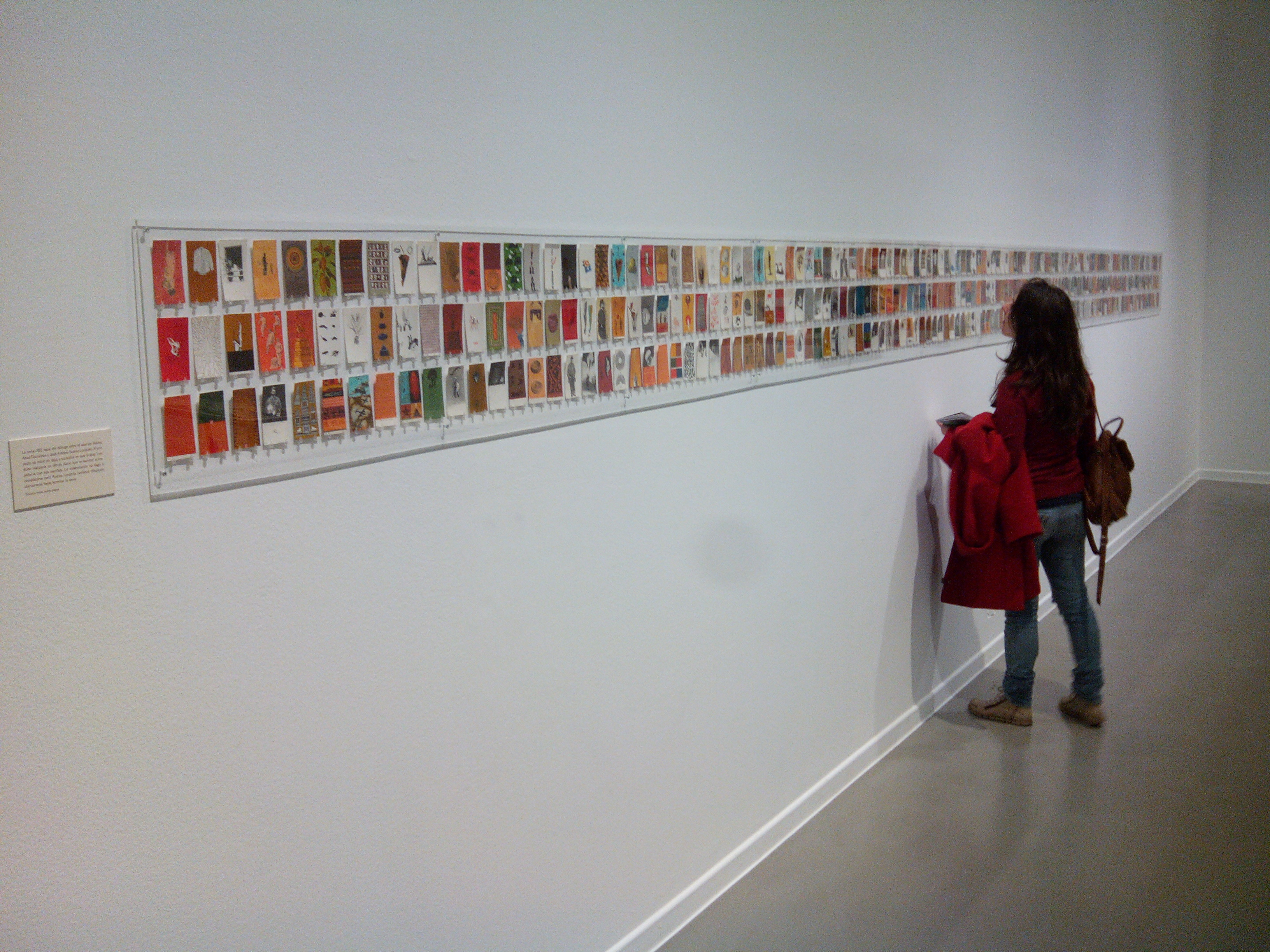 Serie 365 (1994), José Antonio Suárez Londoño. La Casa Encendida, Madrid.